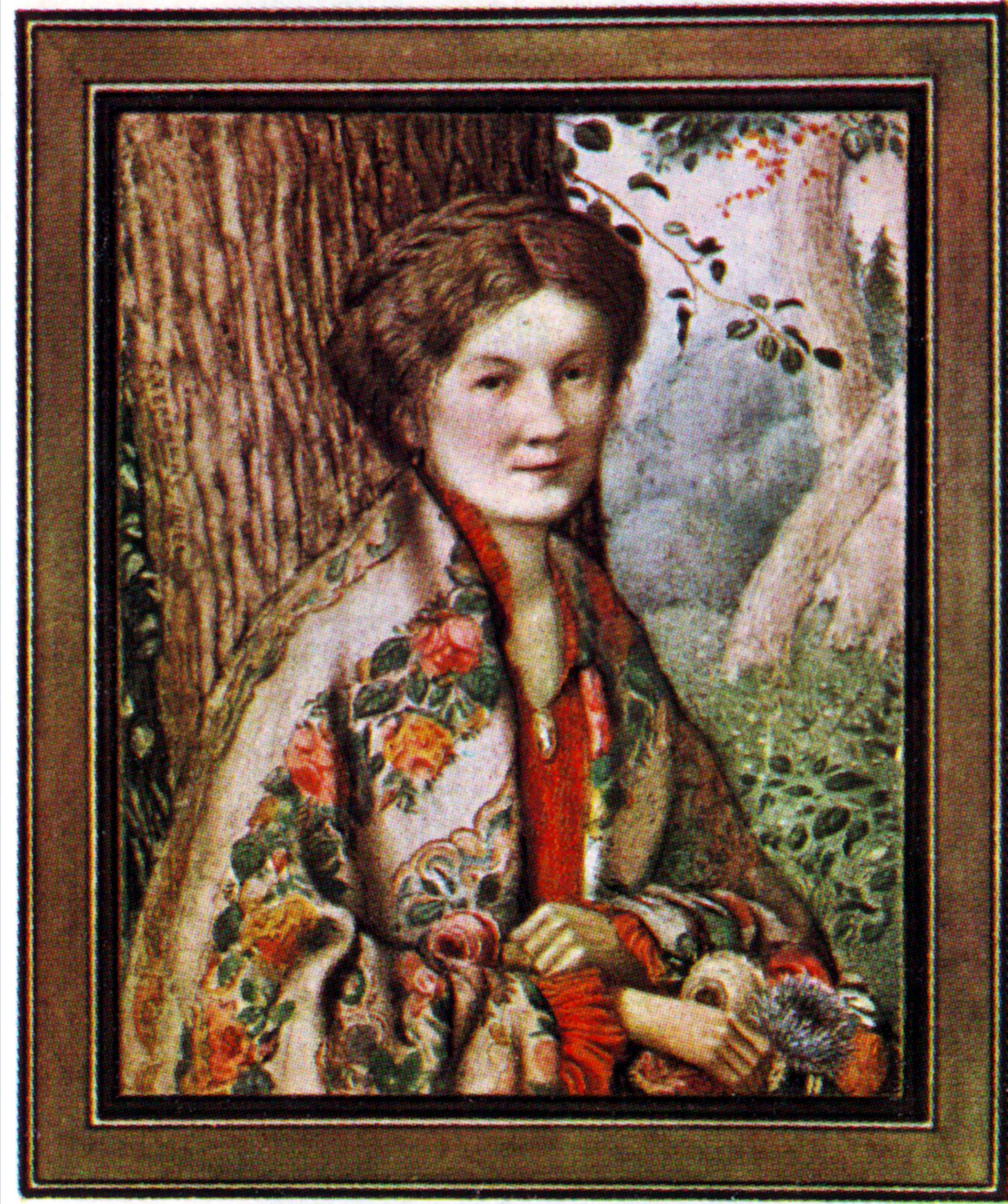 Вера Павловна Нарбут, жена Г.И.Нарбута